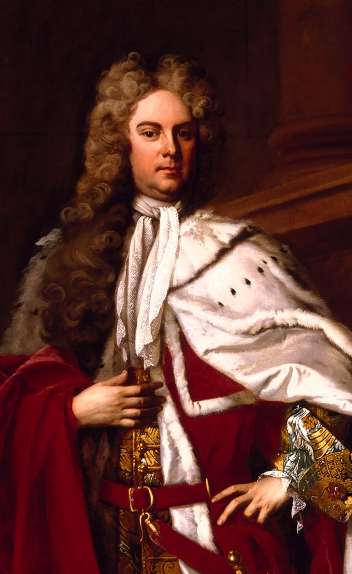 detail